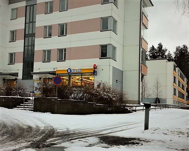 Kangasvuorentie